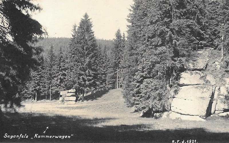 Felsformation Kammerwagen zwischen Hirschenstand / Jelení und Neuhammer / Nové Hamry im böhmischen Erzgebirge